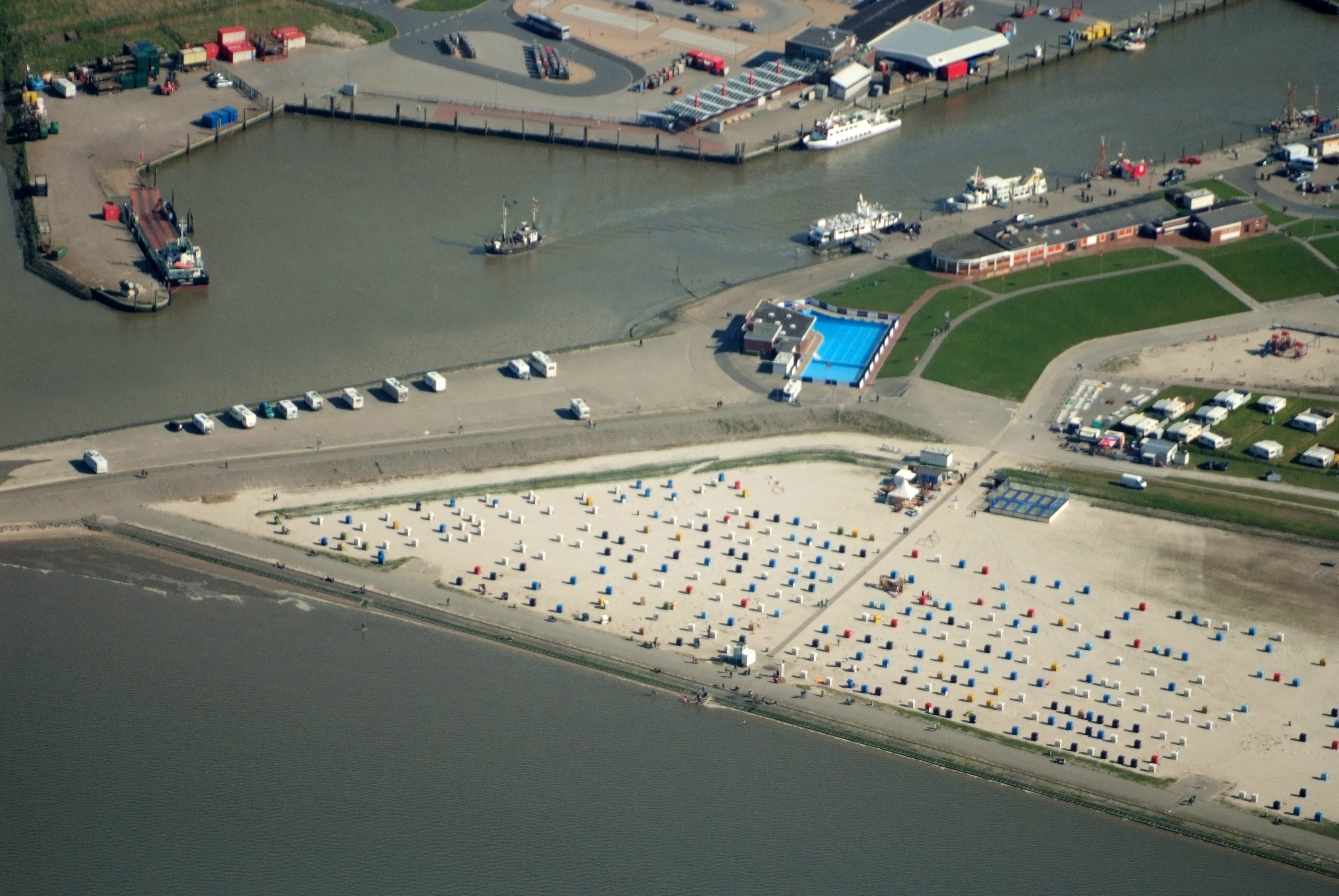 Fotoflug vom Flugplatz Nordholz-Spieka über Bremerhaven, Wilhelmshaven und die Ostfriesischen Inseln bis Borkum